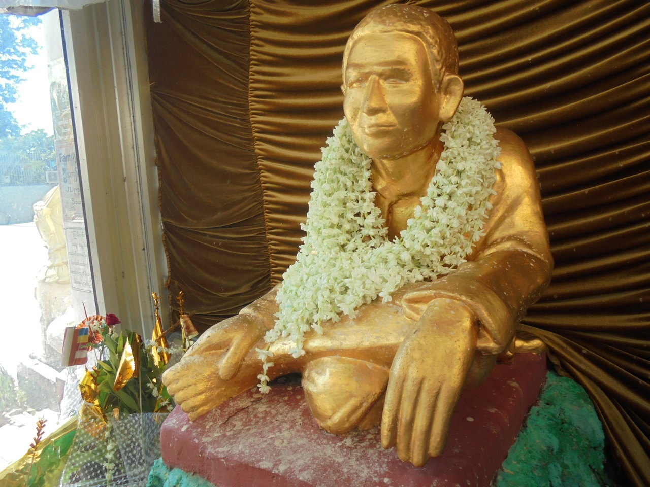 မြန်မာဘာသာ: ဖော်ပြပါ ဘိုးမင်းခေါင် ရုပ်တုသည် ရွှေတိဂုံဘုရား၊ အလယ်ပစ္စယံပေါ်တွင် ရှိသည်။ နောင်တော်ကြီးဘုရားနှင့် ဓမ္မစေတီကျောက်စာအနီးတွင် တည်ရှိသည်။ လွန်ခဲ့သော နှစ်ပေါင်း ၂၆၀ဝ ကျော် (ဘီစီ ၅၈၈ ခန့်က) ဗုဒ္ဓဂေါတမမြတ်စွာဘုရားသက်တော်ထင်ရှားရှိစဉ်က 'အဇိတ' အမည်ရှိ အညတရ ရဟန်းငယ်တစ်ပါးသည်လည်းကောင်း၊ နောင်အခါ ထို အဇိတ ရဟန်းသည် သင်္ကန်းဝတ်မှ ရသေ့ဝတ်သို့ပြောင်းကာ တောထွက်တော်မူခဲ့သော ရှင်ရသေ့ကြီး 'ဒိဗ္ဗစက္ခု'သည်လည်းကောင်း၊ ရွှေတိဂုံဘုရားဒါယကာ သိကြားမင်းနှင့်မယ်တော်မယ်လမုတို့၏သားတော် ဥက္ကလာပမင်းကြီးသည်လည်းကောင်း၊ ပုဂံခေတ်ဦး ရှင်အရဟံသည်လည်းကောင်း၊ မွန်ဘုရင်မကြီး ရှင်စောပု၏ သမက်တော်-ပဲခူး (ဟံသာဝတီ) မွန်ဘုရင် ဓမ္မစေတီမင်းသည်လည်းကောင်း၊ အလောင်းဘုရား ဦးအောင်ဇေယျ၏ သားတော်-ဘိုးတော်ဘုရား (ဘိုးတော်ဦးဝိုင်း)၏ မြစ်၊ ဘကြီးတော်ဘုရား၏သားတော် စကြာမင်းသားသည်လည်းကောင်း ဘိုးမင်းခေါင်၏ဘဝဟောင်းပုံရိပ်များ ဖြစ်ကြသည်ဟုဆိုသည်။